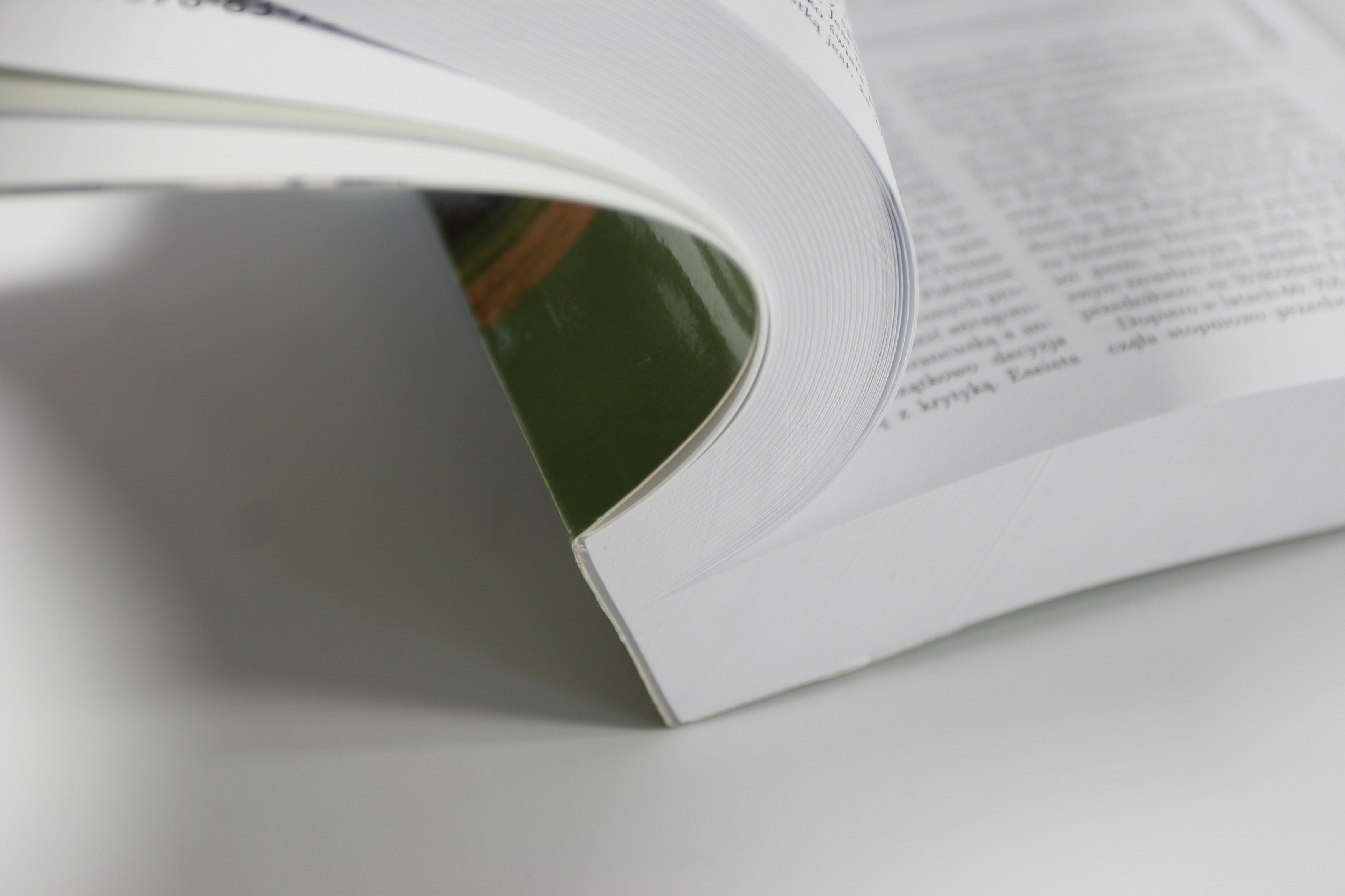 Softcover-Buch mit Klebebindung